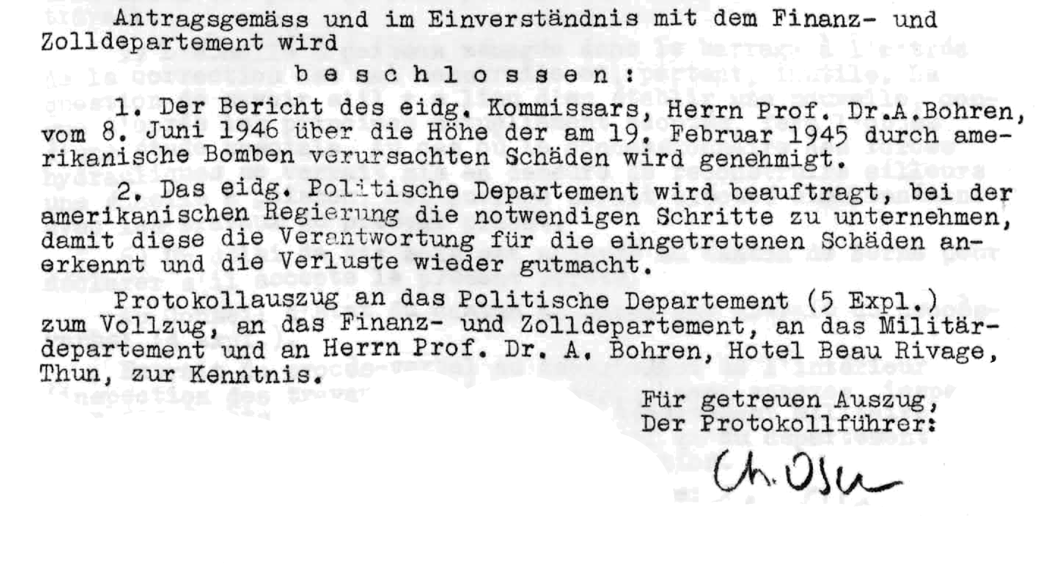 Bundesratsprotokoll vom 27. Juni 1946 (Präsidialverfügung) betreffend Bombenschäden vom 19. Februar 1945 in Full-Reuenthal, Kanton Aargau